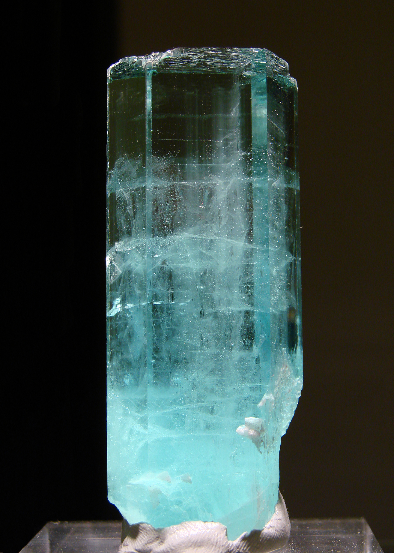 Aigue-marine. Provenance: Shigar Skardu, Pakistan.